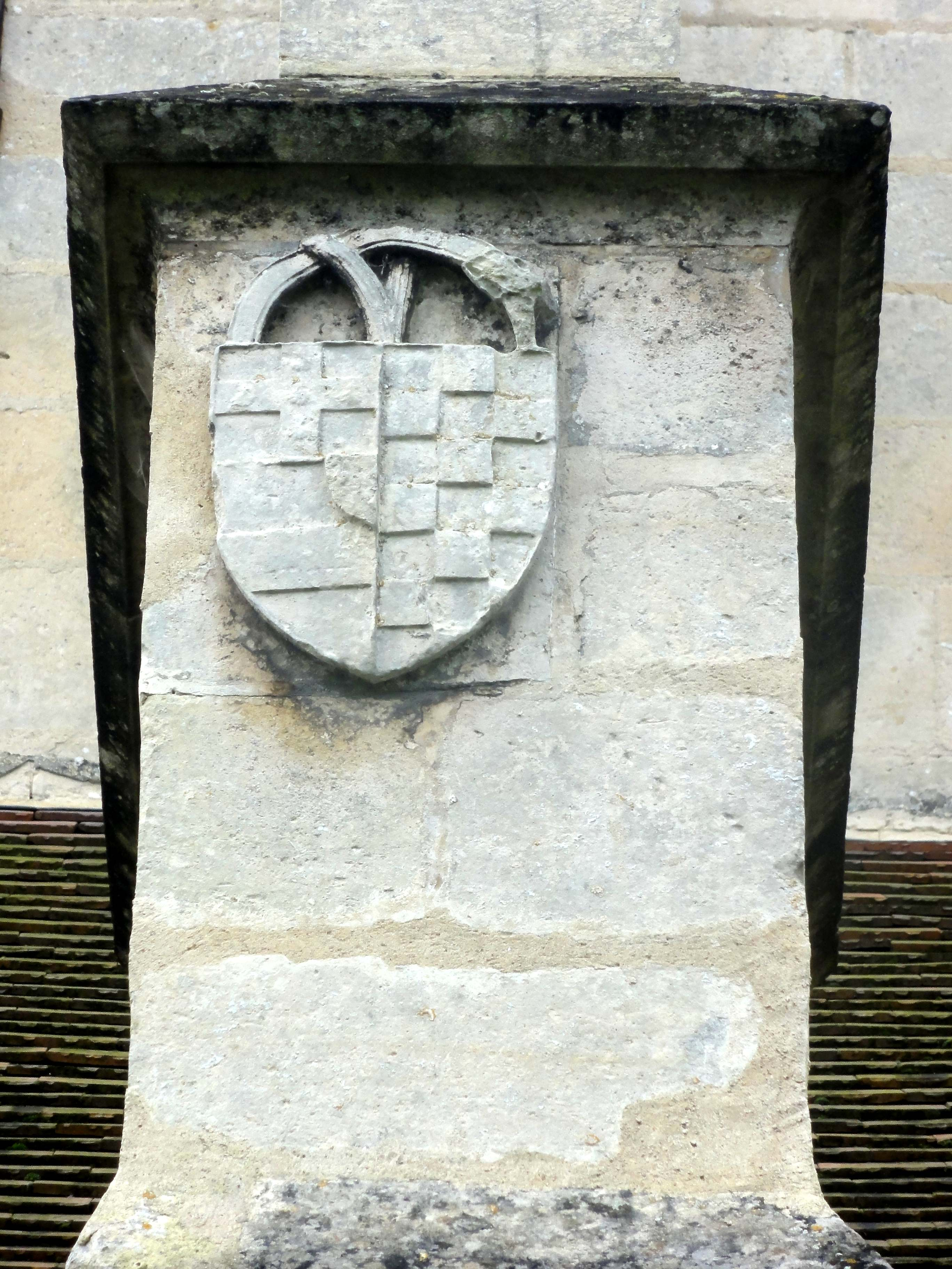 Écu parti de Louis de Saint-Gelais et de Gabrielle Rochechouart de Mortemart, fille de François, qu'il épousa en deuxièmes noces en 1565, sur la culée d'un arc-boutant au nord.